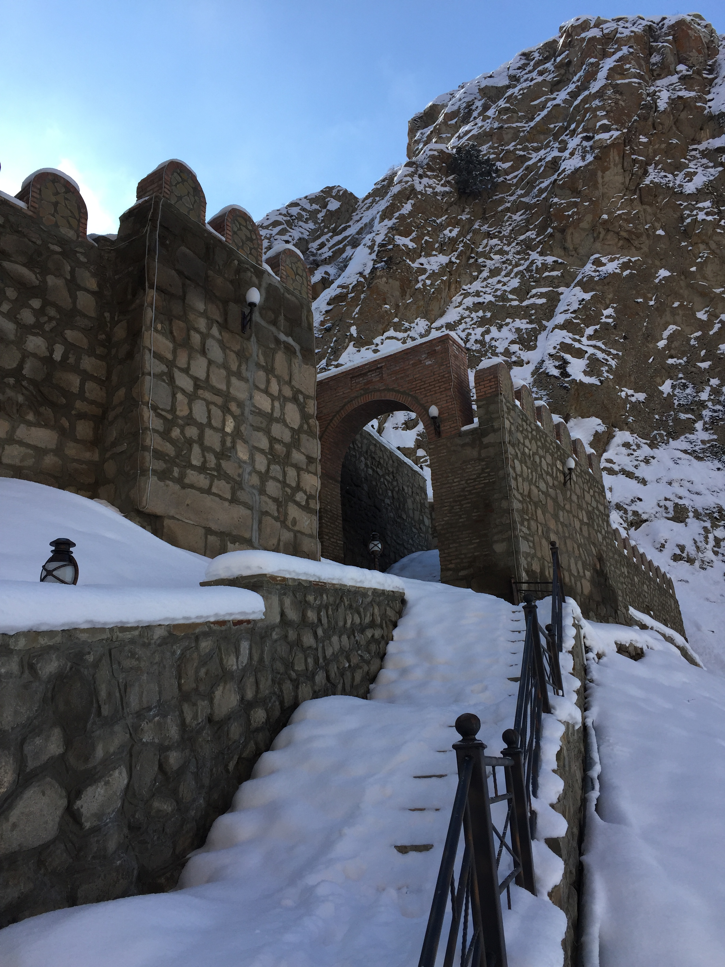 Əlincə qalası qışda